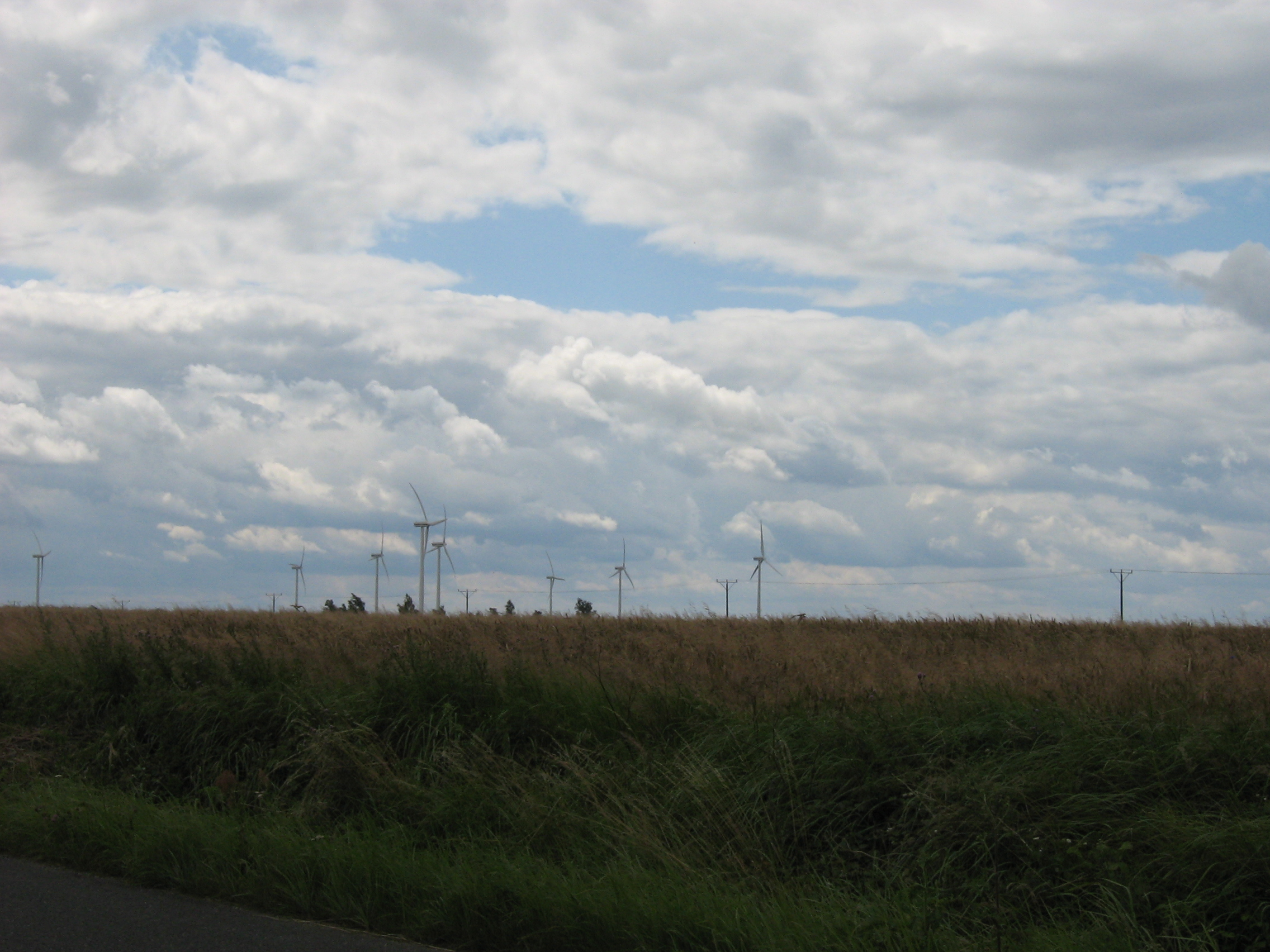 Ferma wiatrowa w pobliżu wsi Zagórze w Polsce